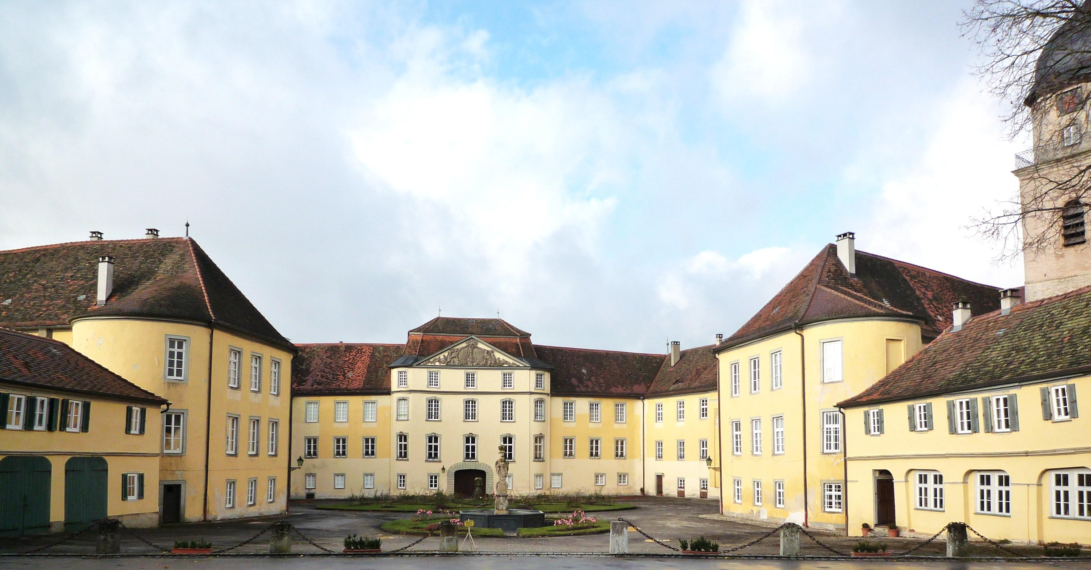 Barockschloss Bartenstein mächtigem Kirchturm. Dreiflügelanlage nach Plänen von Gallasini